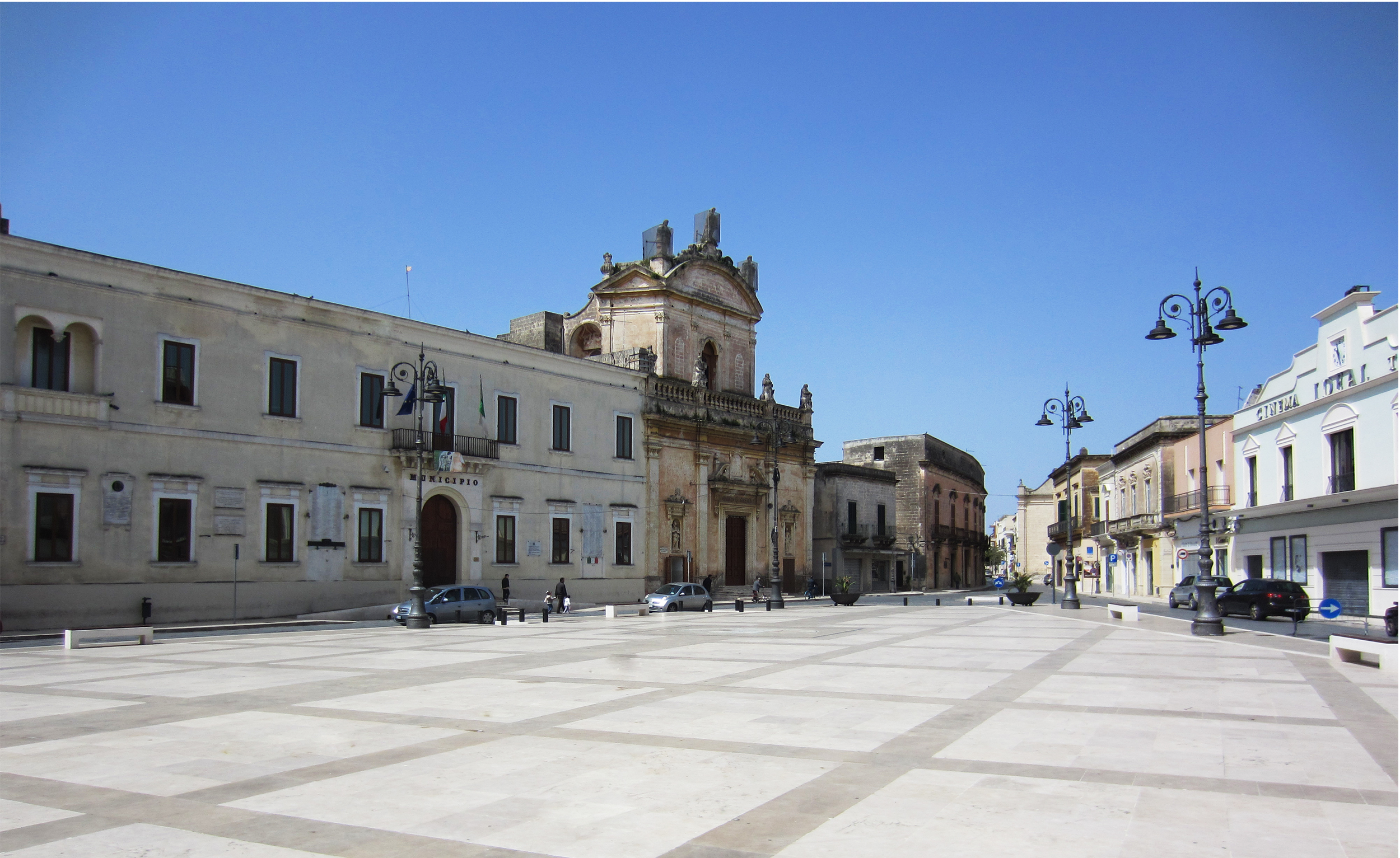 Piazza Garibaldi Veduta aprile 2014